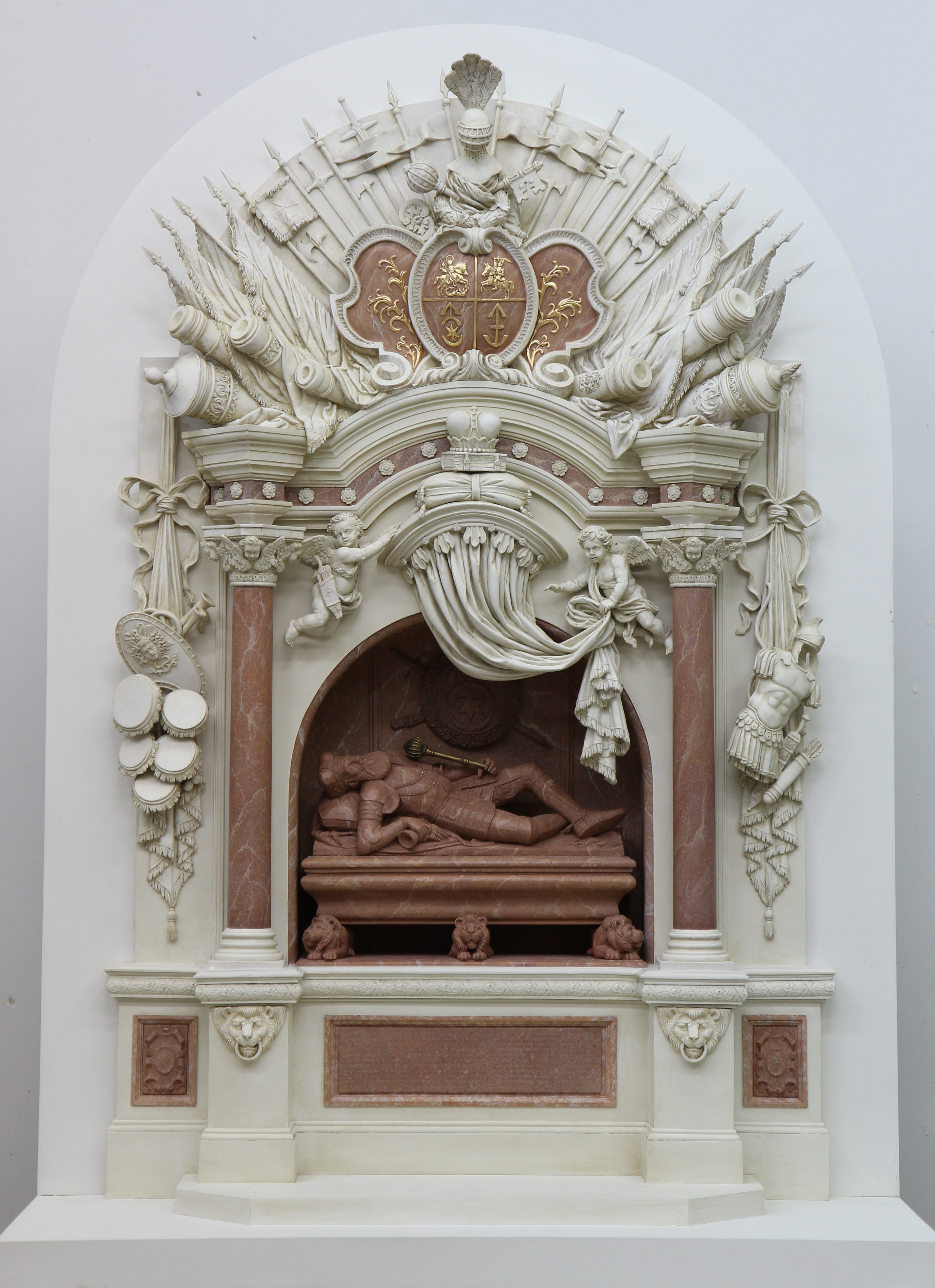 Макет надгробного пам'ятника князю Костянтину Острозькому. Автори: Б. Крилов, О. Сидорук, А. Сакалаускас